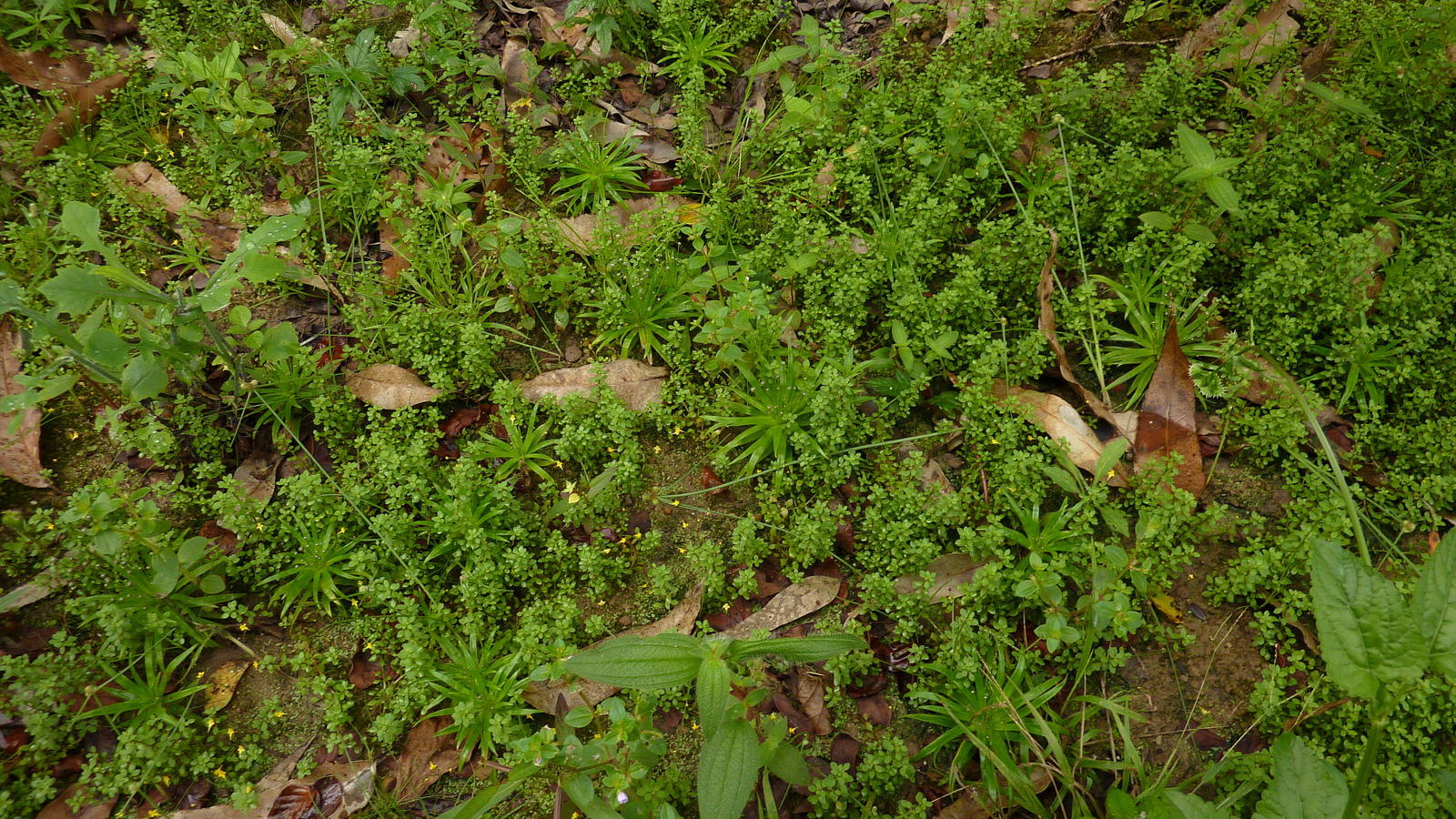 Anagallis minima (L.) Krause